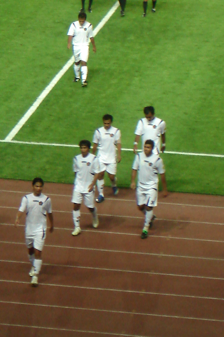 China: Spieler des indonesischen Vereins Persik Kediri in der Halbzeitpause des AFC-Champions-League-Spiels gegen Shanghai Shenhua im Yuanshen Stadium.